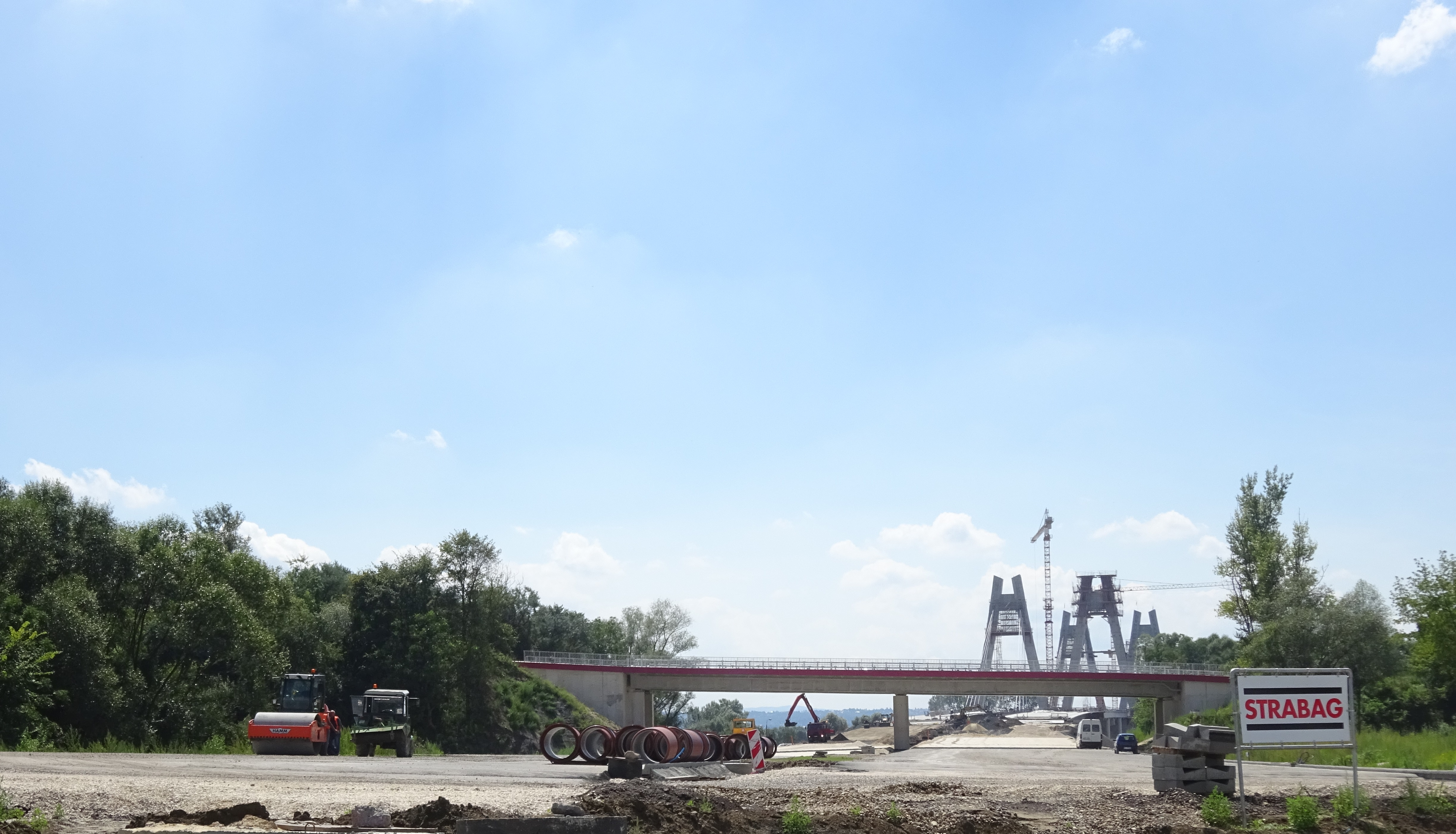 Budowa drogi ekspresowej S7 na odcinku Węzeł Rybitwy - Węzeł Igołomska. Odcinek opodal ul. Giedroycia. W tle - jeden z wiaduktów i budowany most na Wiśle. Kraków, 2016.